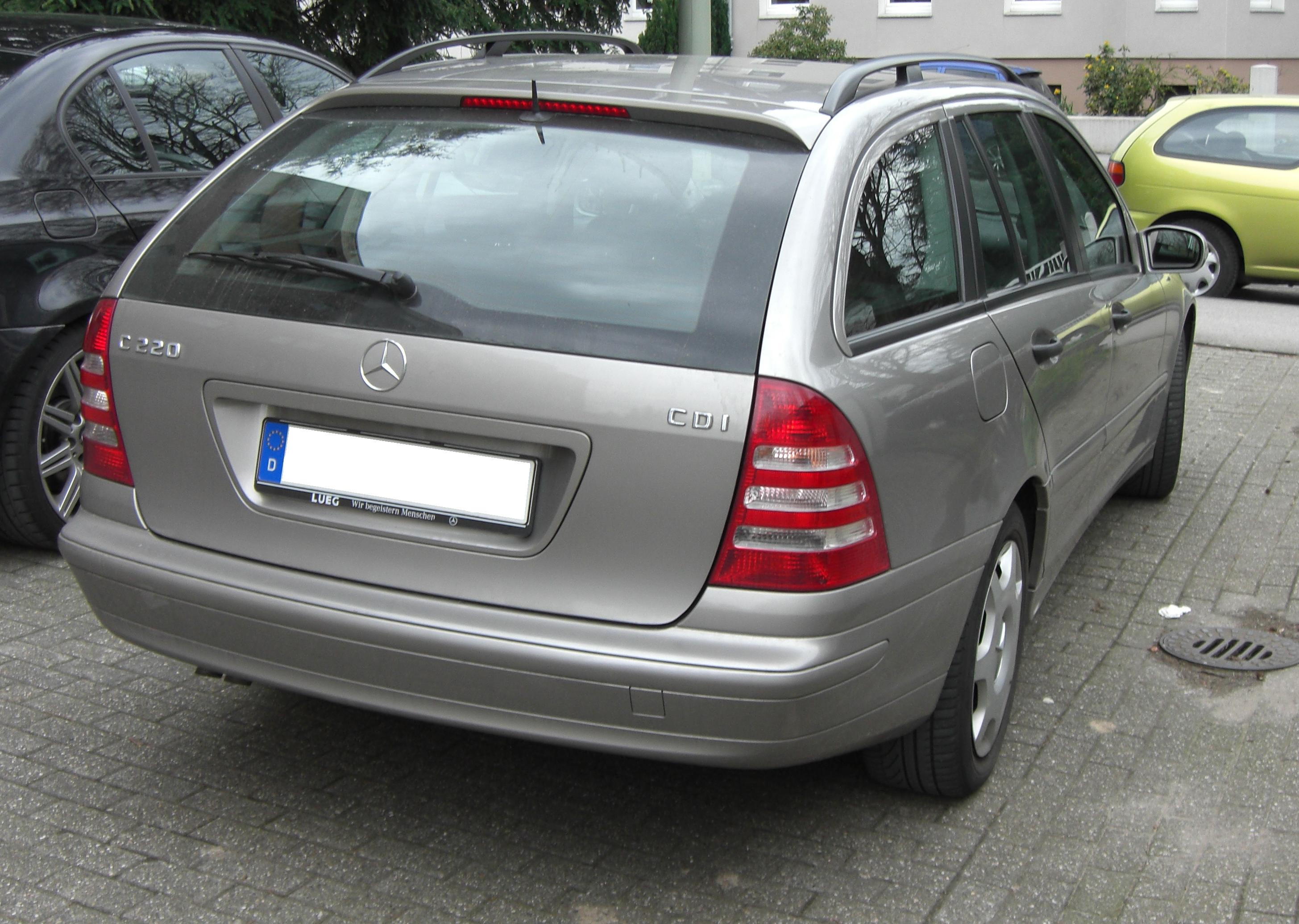 Mercedes C220CDI T